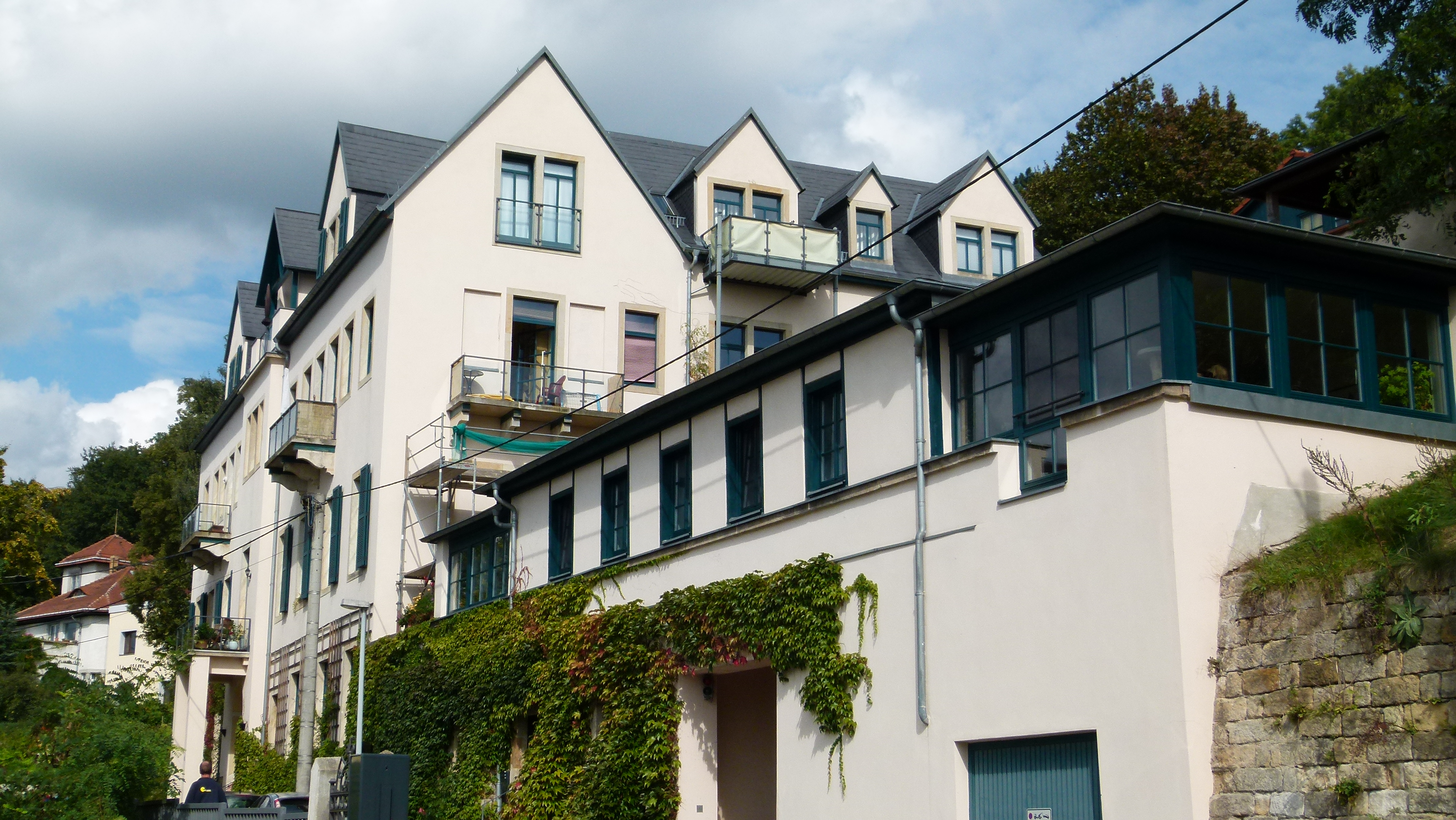 Denkmalgeschützte Ausstattungsteile des ehem. Hotels "Victoriahöhe", Veilchenweg 19 in Loschwitz, Dresden